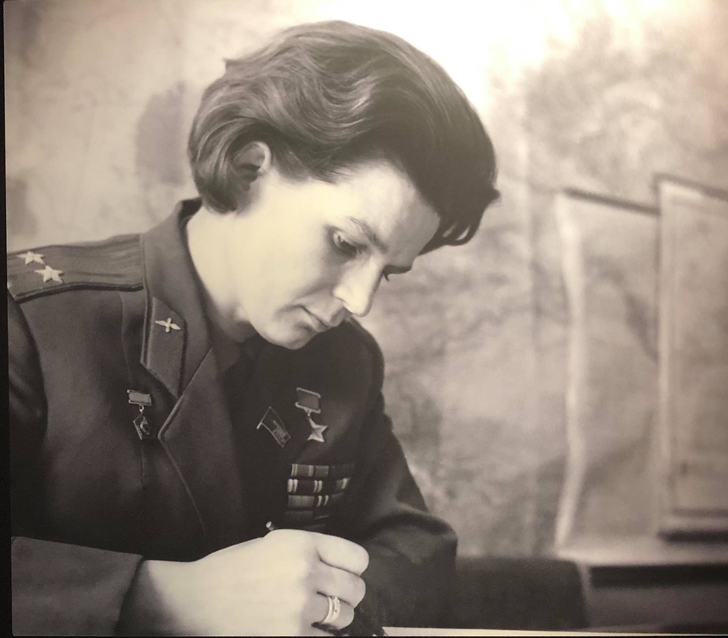 Teresjkova under studium ved det sovjetiske luftvåbens akademi for ingeniører. Moskva, 1964. Fotografiet findes på Museet For Kosmonauter i Moskva.